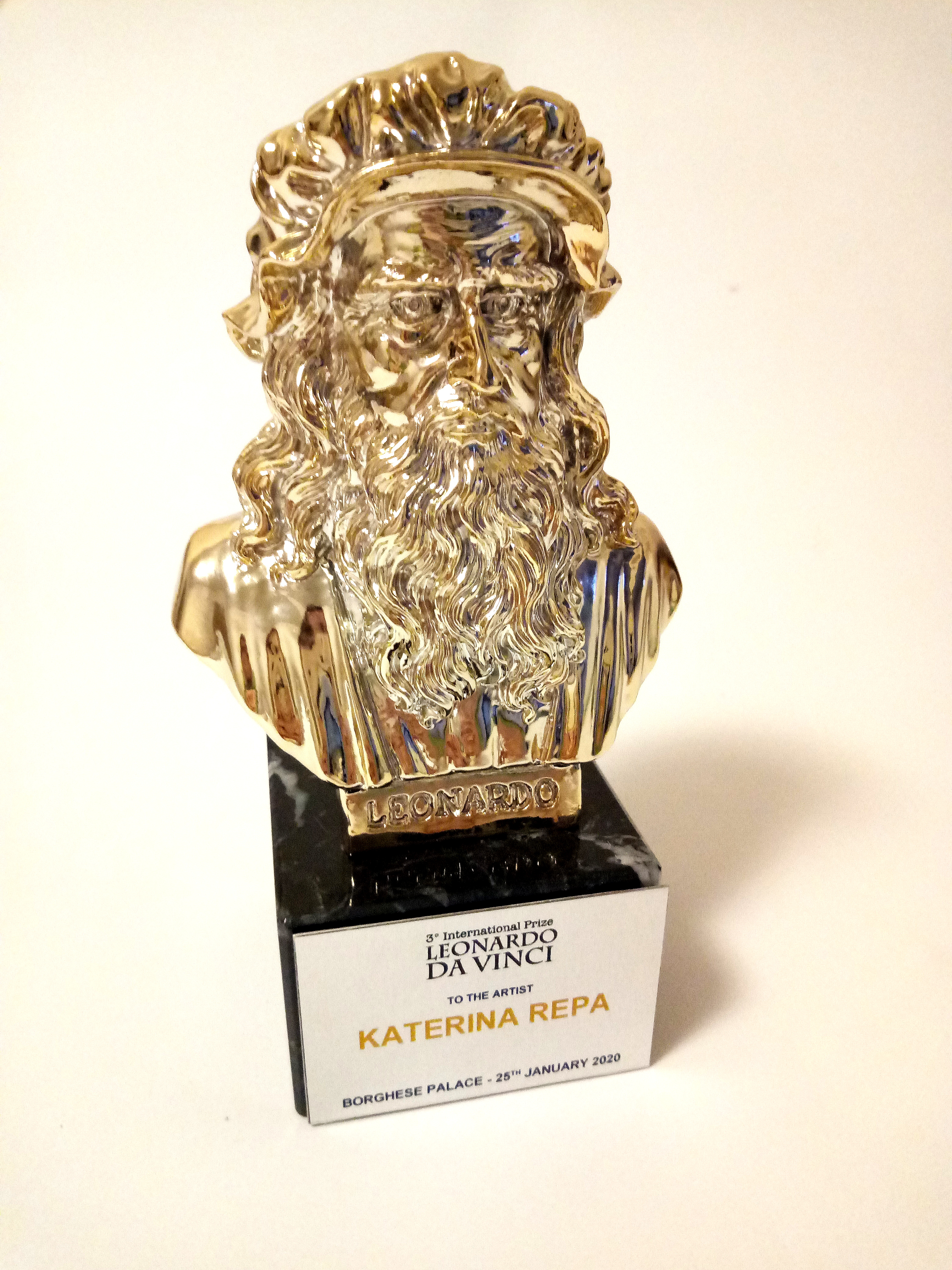 Міжнародної премії Леонардо да Вінчі